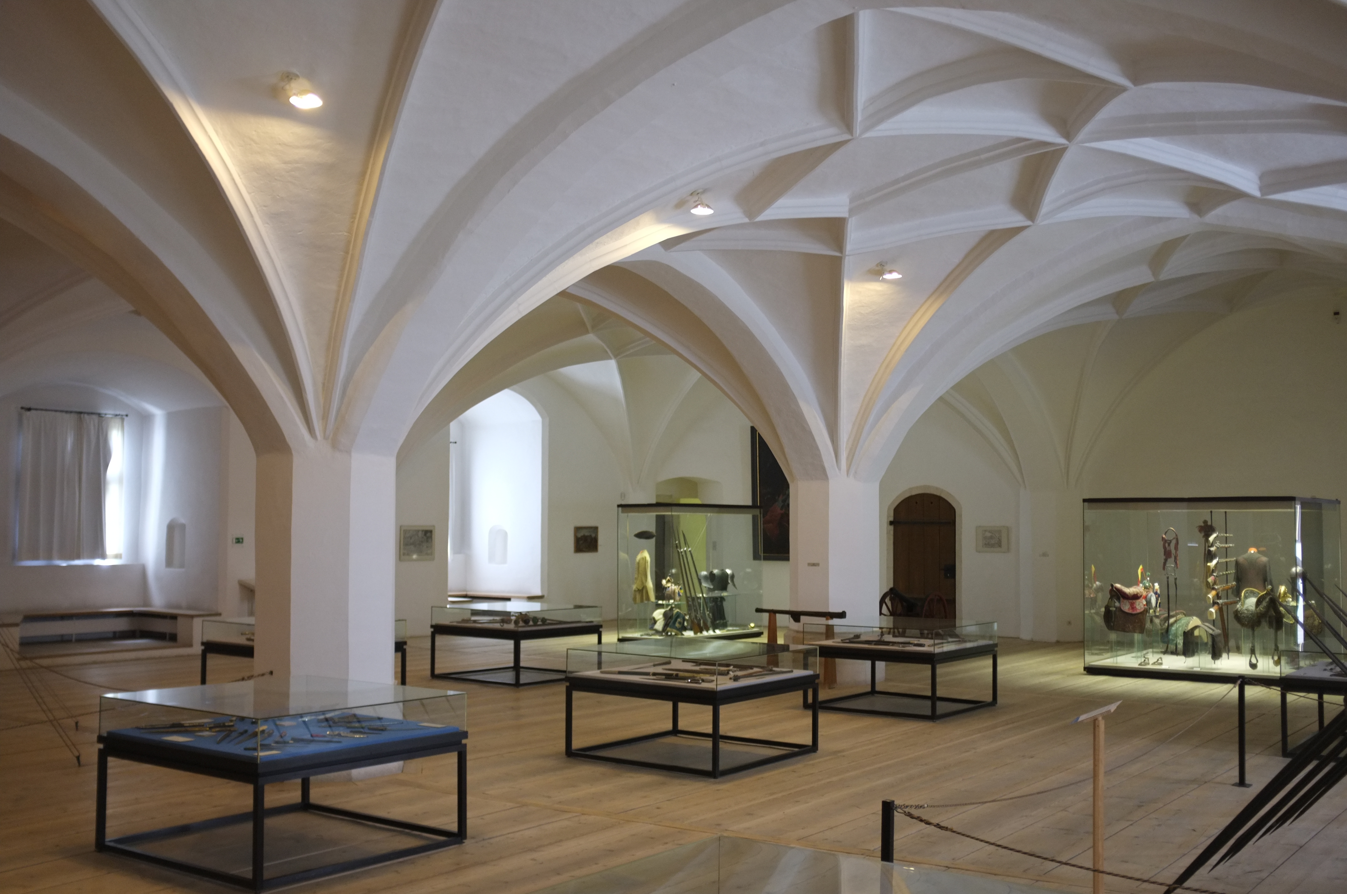 Ausstellungsraum des Bayerischen Armeemuseums im Neuen Schloss Ingolstadt